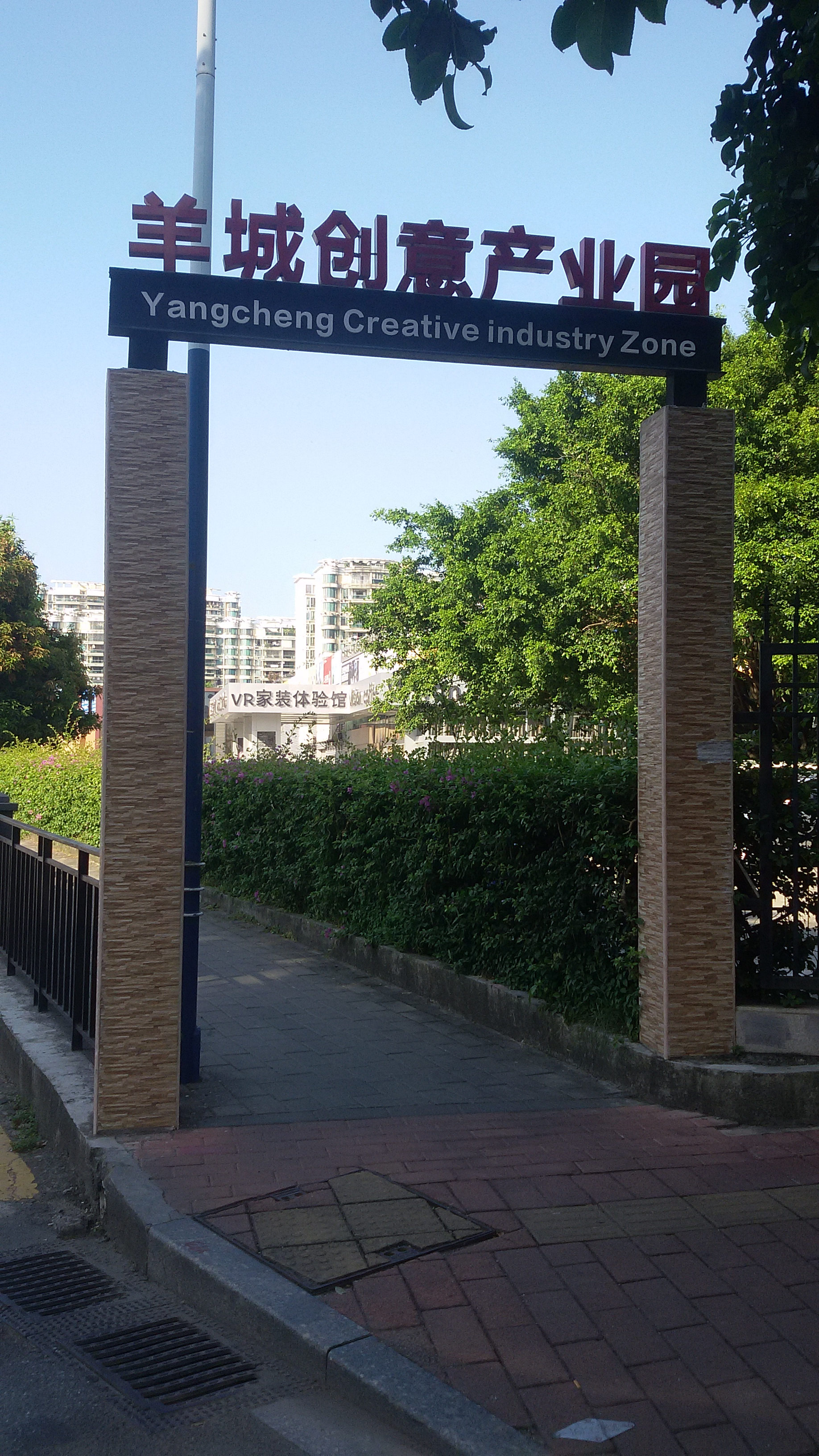 粵語: 羊城创意产业园5号门